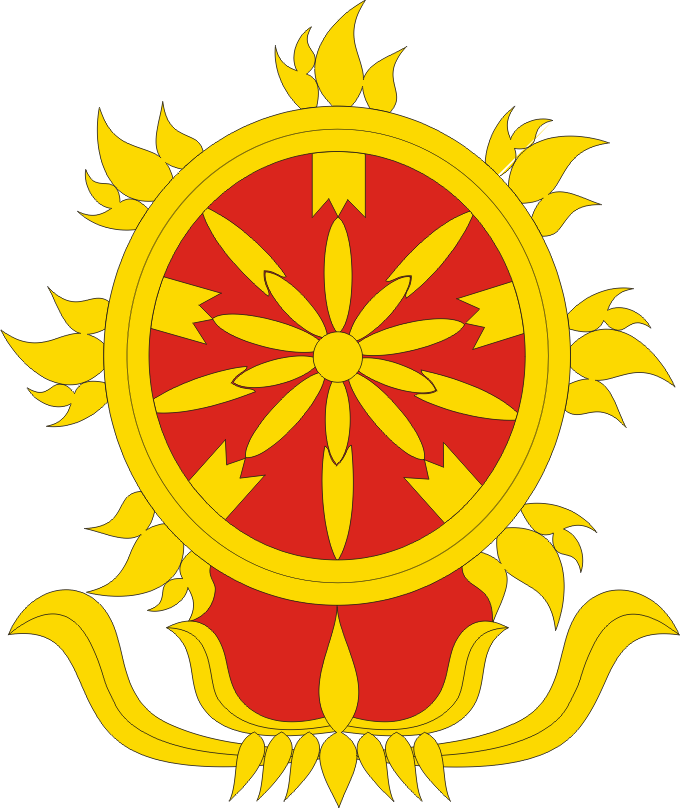 Gambar ini adalah Lambang Komando Cadangan Strategis Angkatan Darat